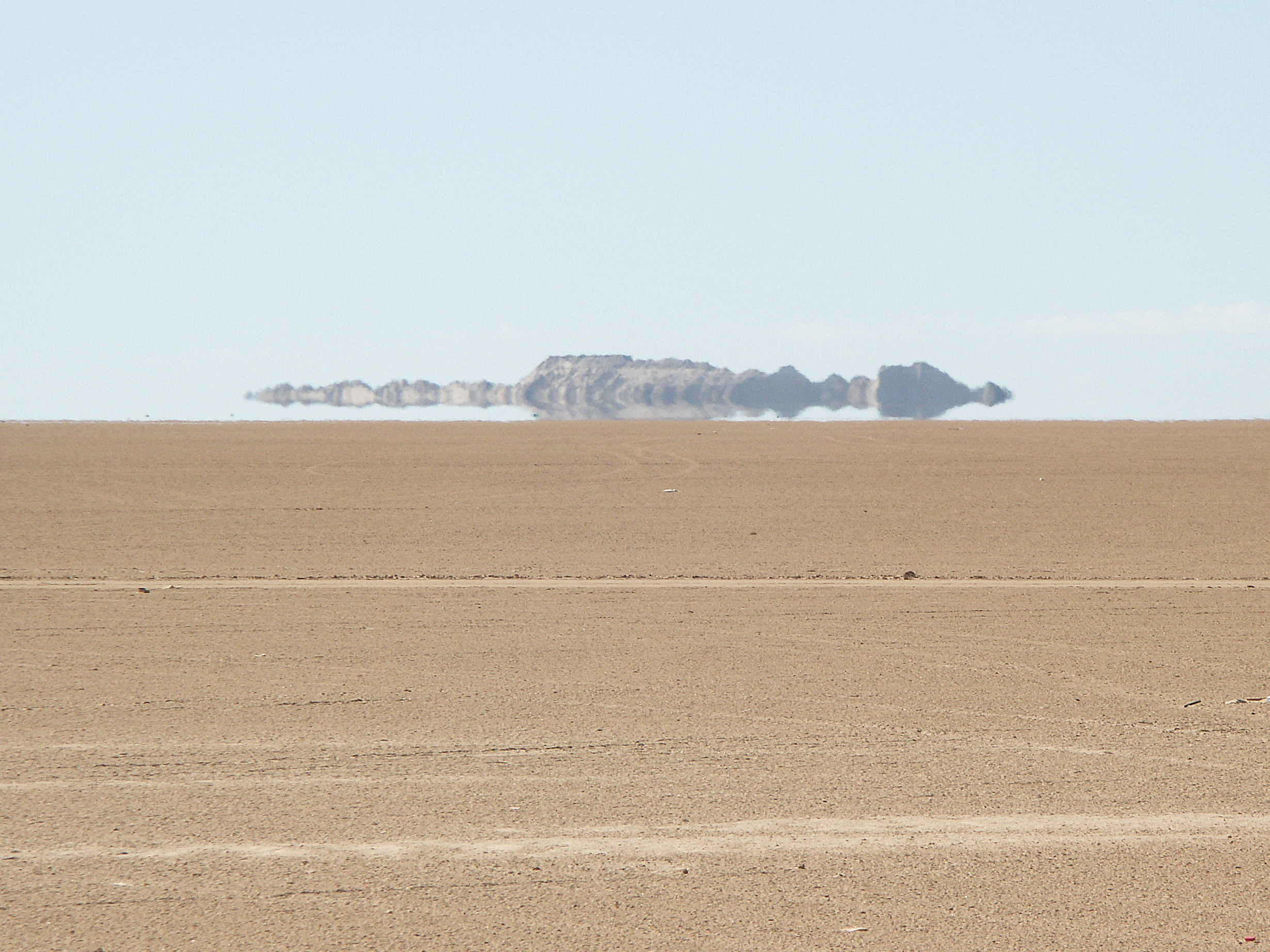 Mirage in Sahara